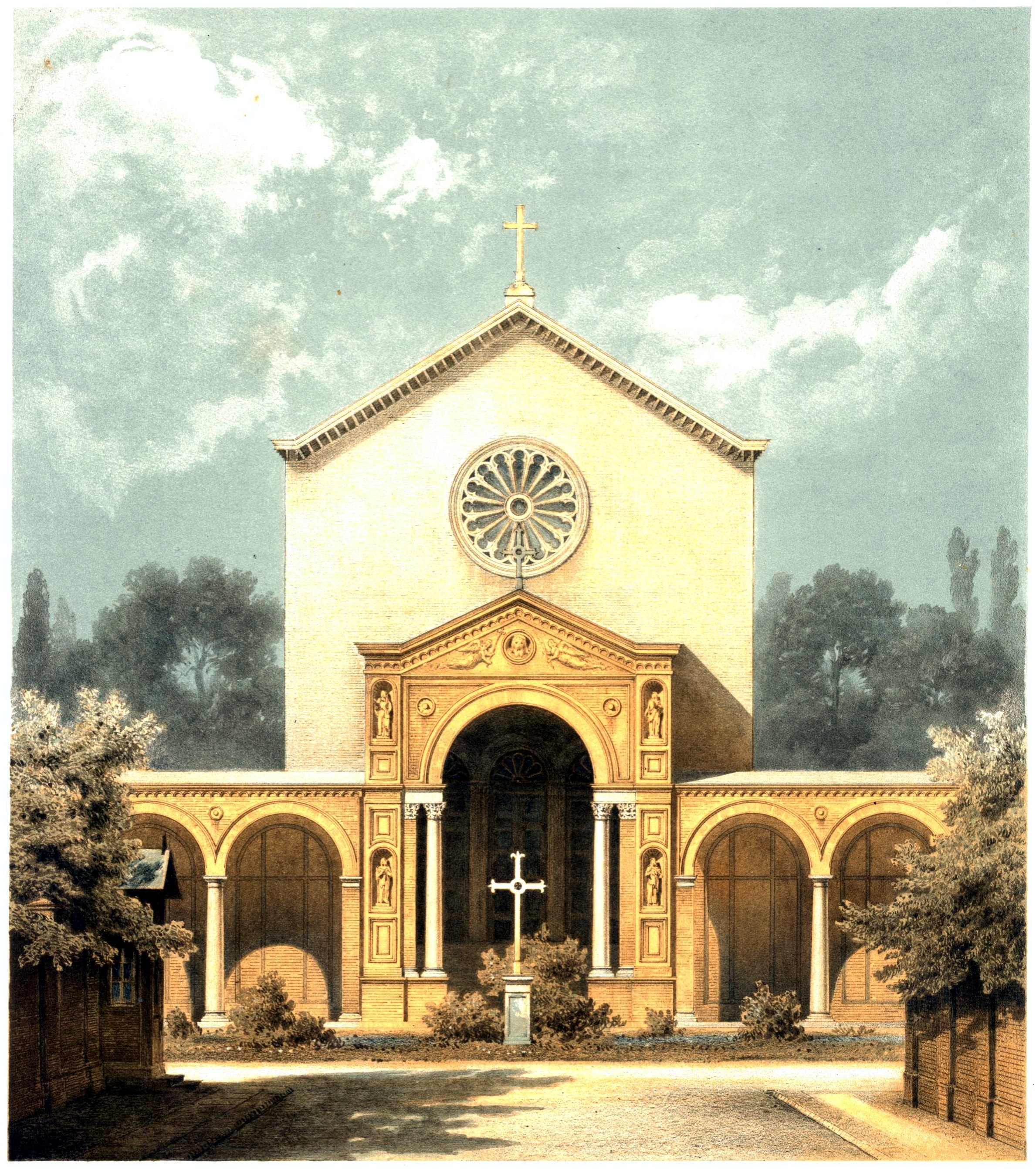 Vorhalle der St. Johannis-Kirche in Berlin-Moabit.